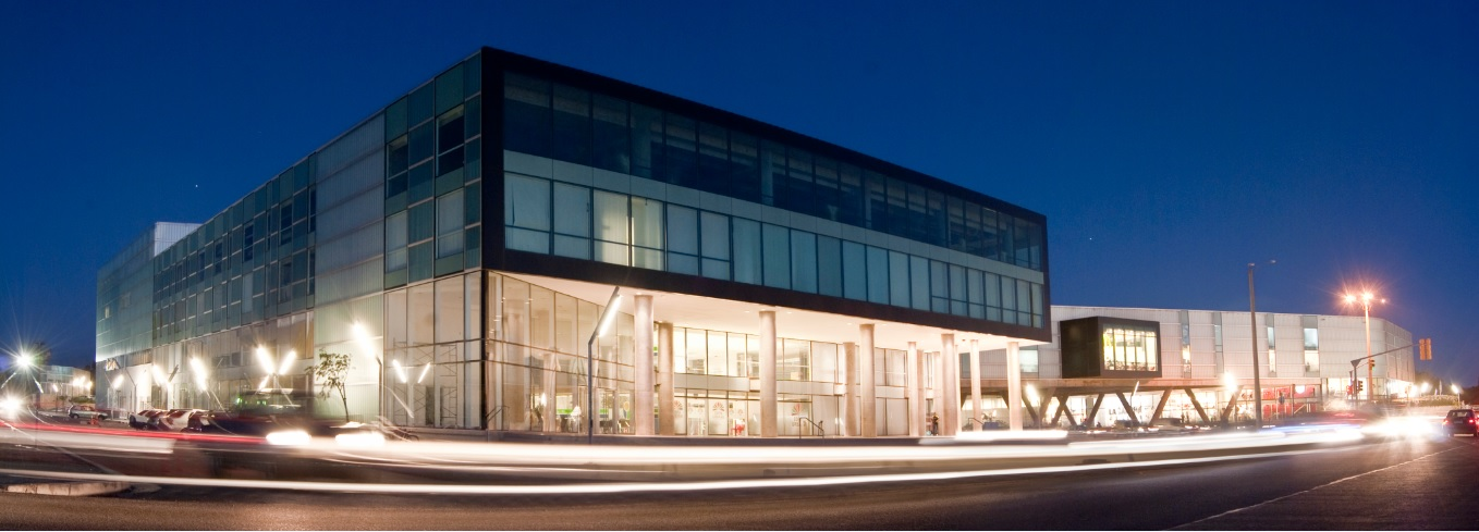 Foto del exterior del Costa Urbana Shopping de noche.